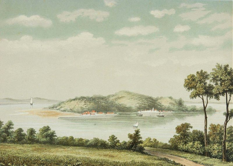 Litho. Litho naar een oorspronkelijke aquarel van J.C. Rappard.. Riau op Sumatra